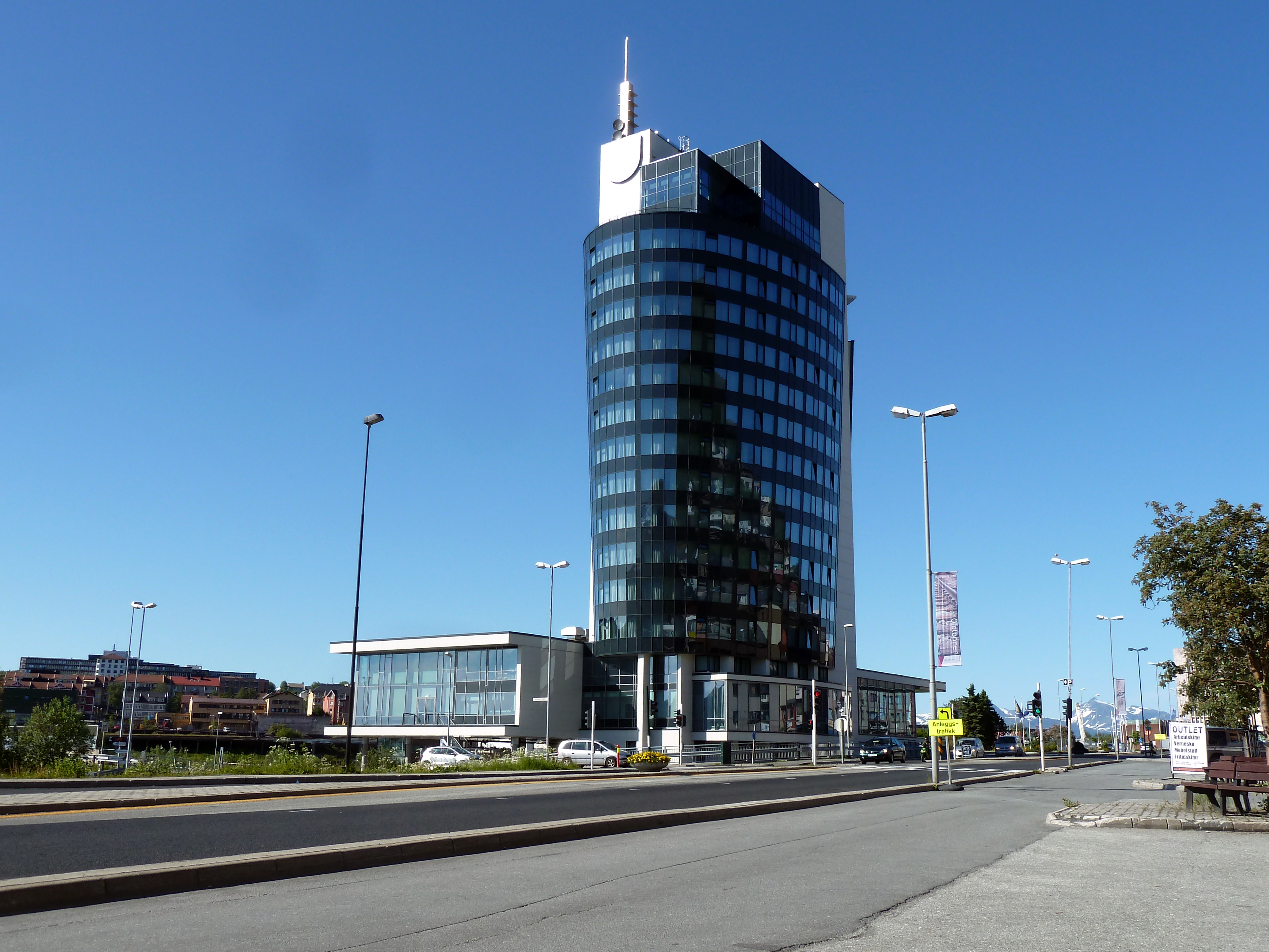 Rica hotell i Narvik.